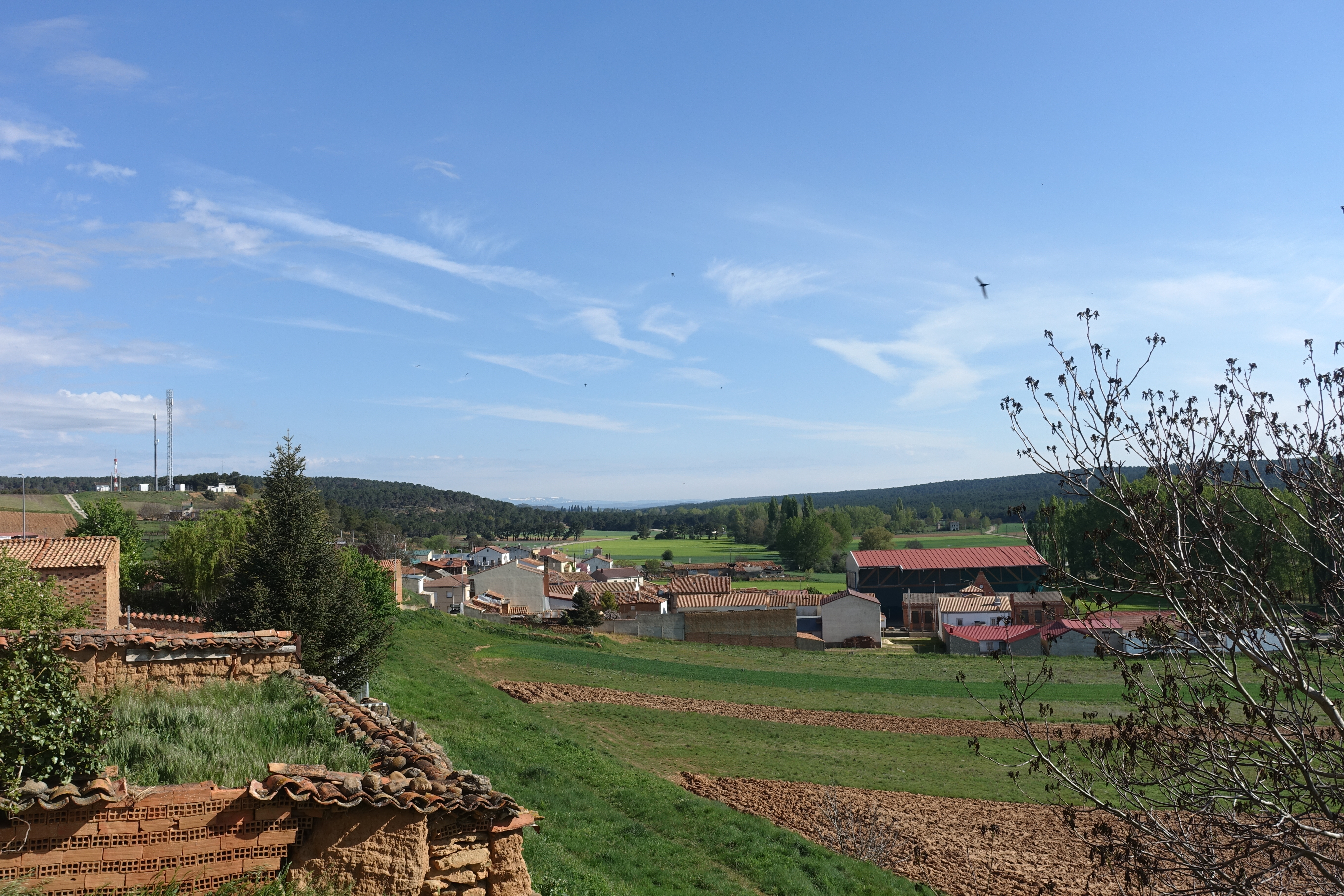 Vista parcial de Matamala de Almazán (Soria, España).